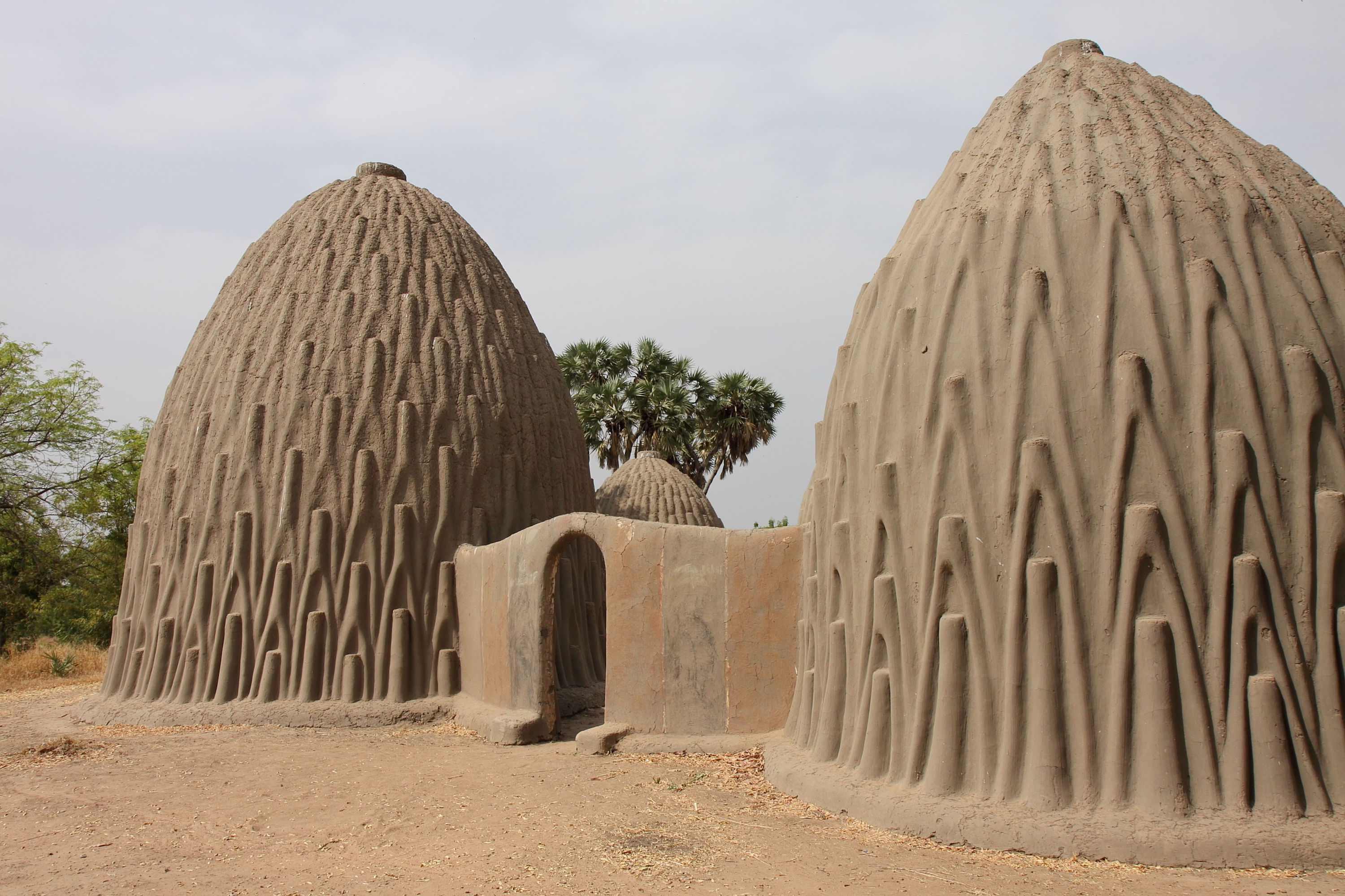 Habitation mousgoum de Pouss dans l’extrême nord ; l'entrée